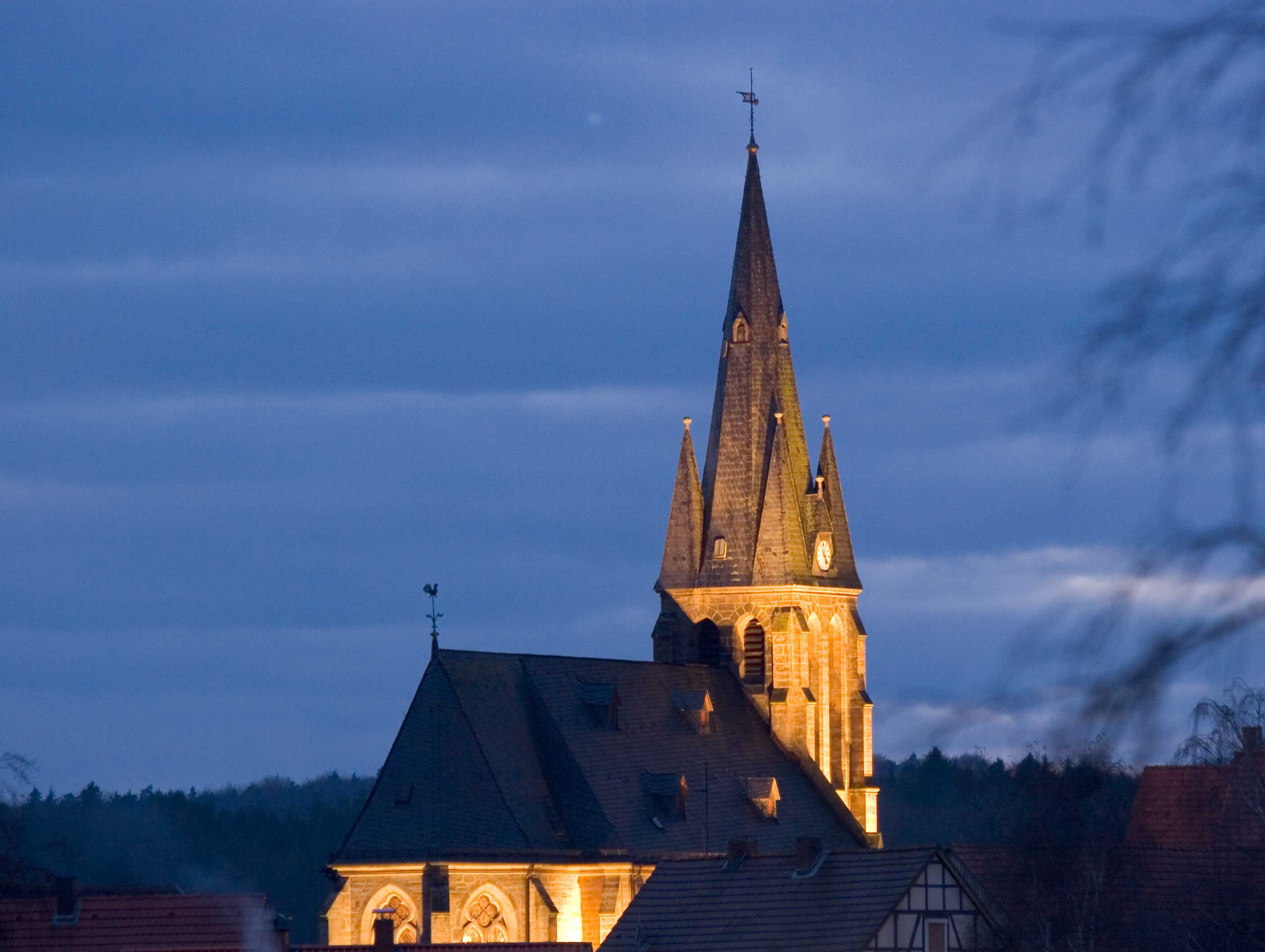 Evangelische Mengsberger Kirche